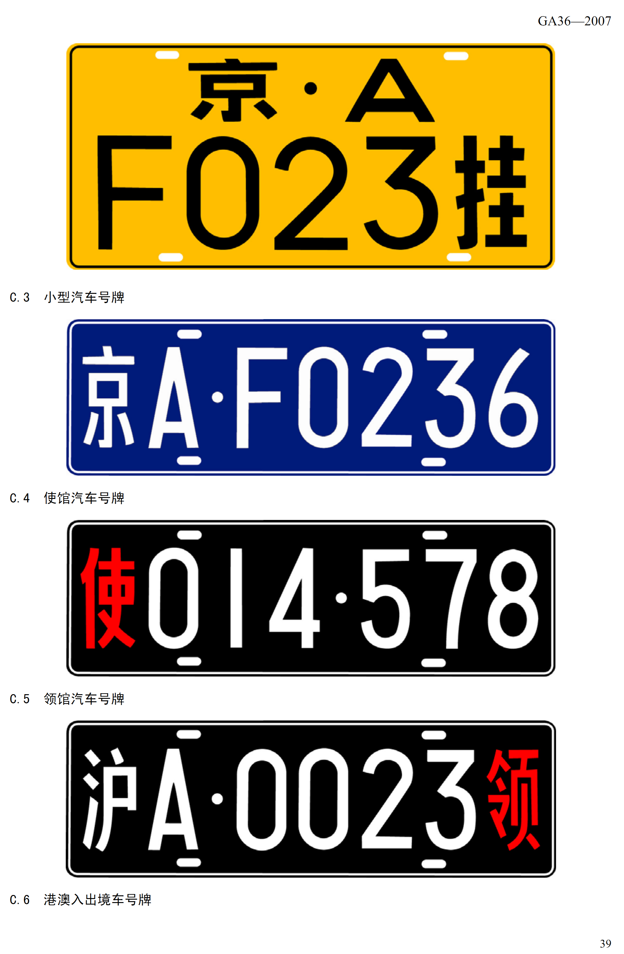 中文（中国大陆）: 中华人民共和国机动车号牌示意图(2)